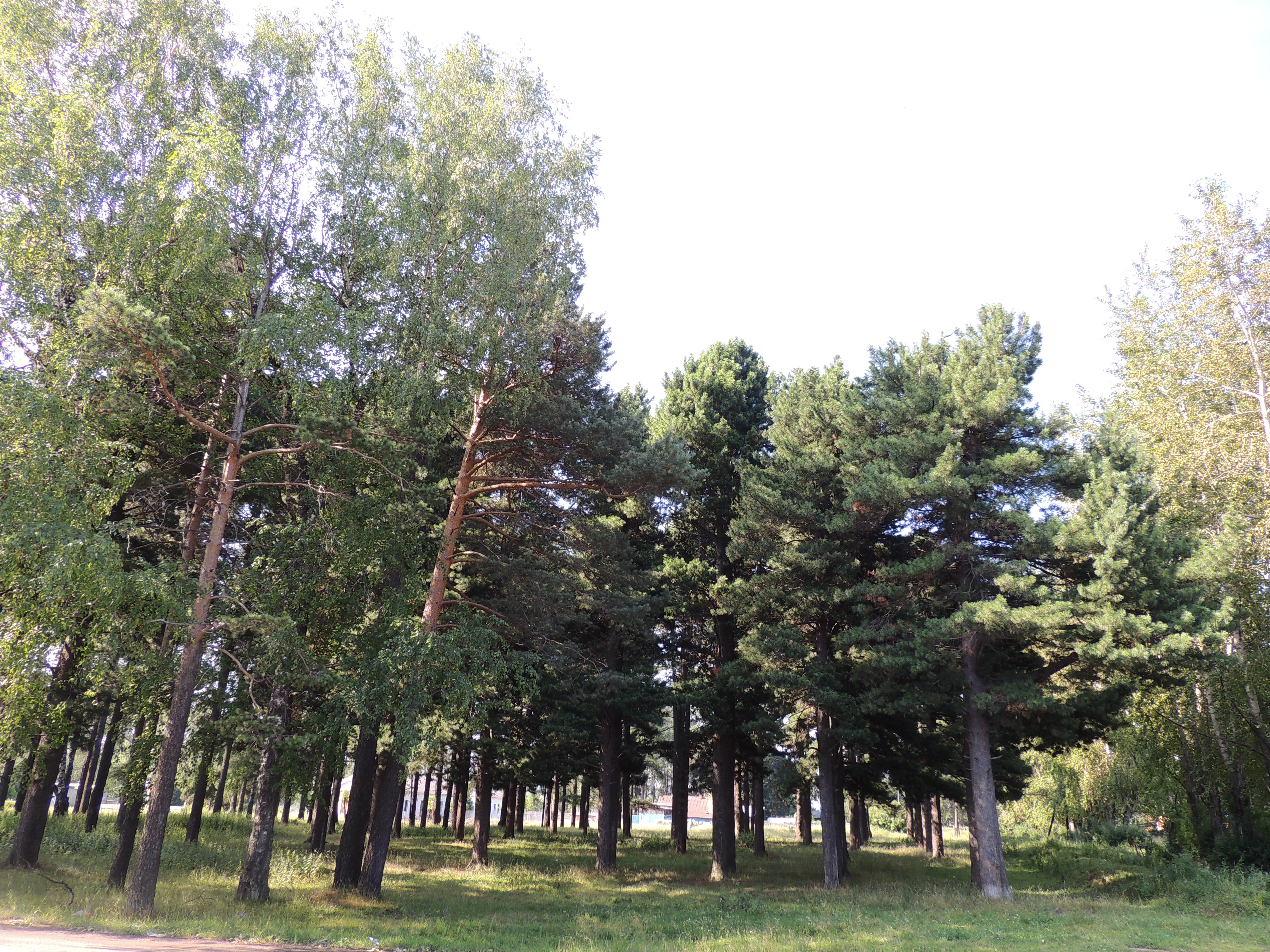 Лиственнично-кедровая роща в Карпинске. Ботанический памятник природы Свердловской области. This image is related to the protected area of Russia number 6610339